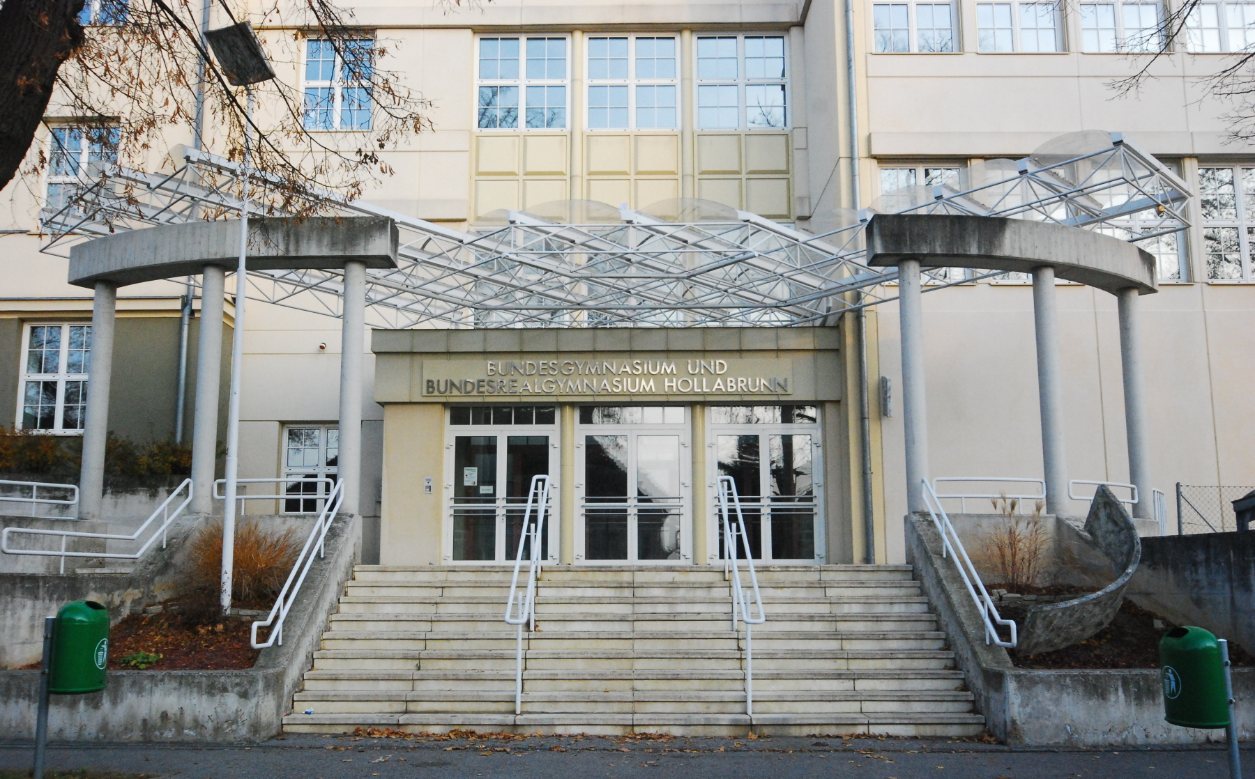 Bundesgymnasium